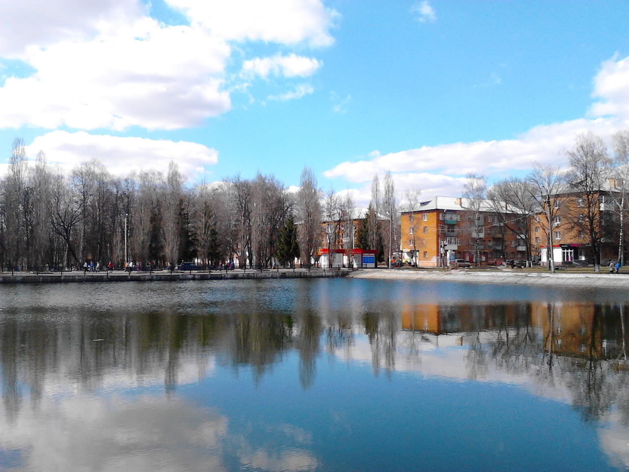 Тульская область . Город Узловая . Россия .